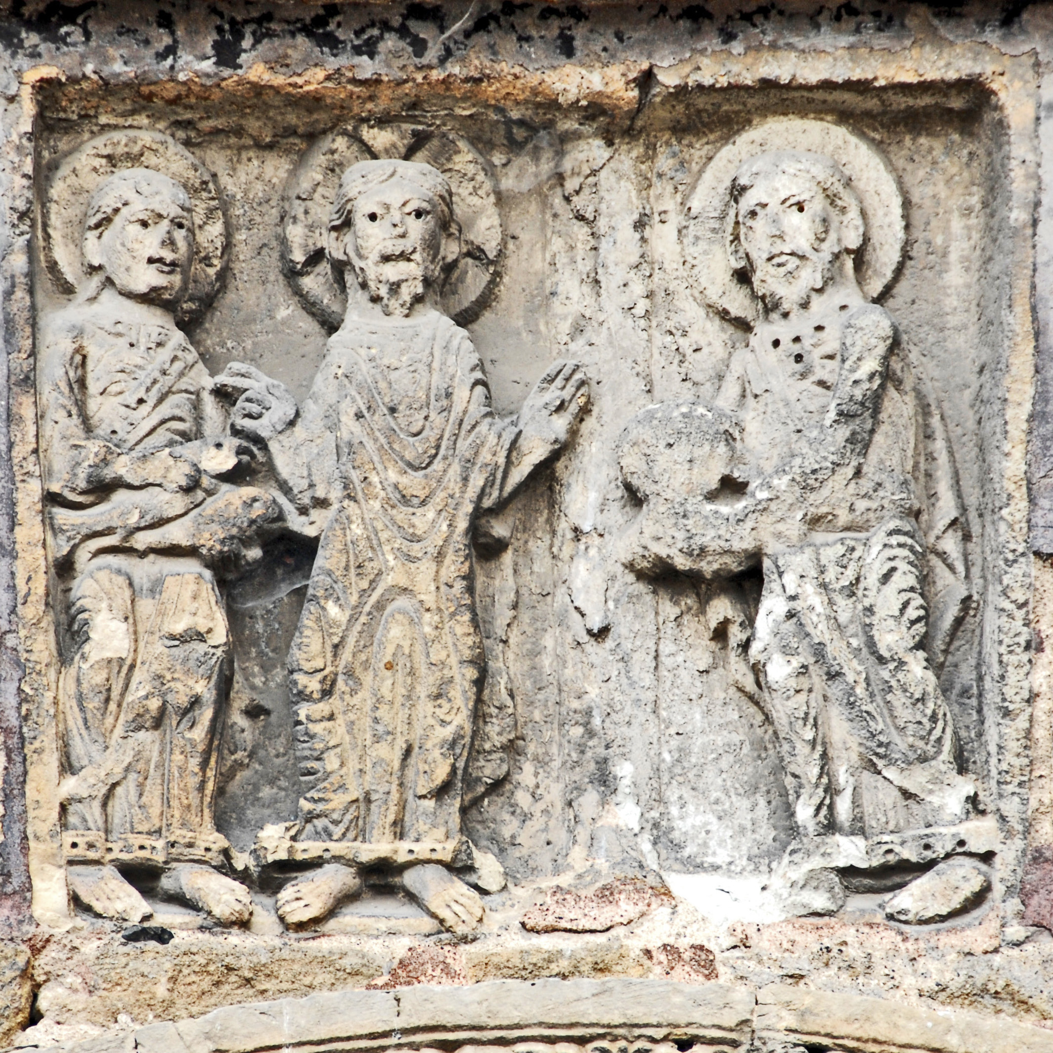 Relief ü.Nordportal, wunderbare Brotvermehrung